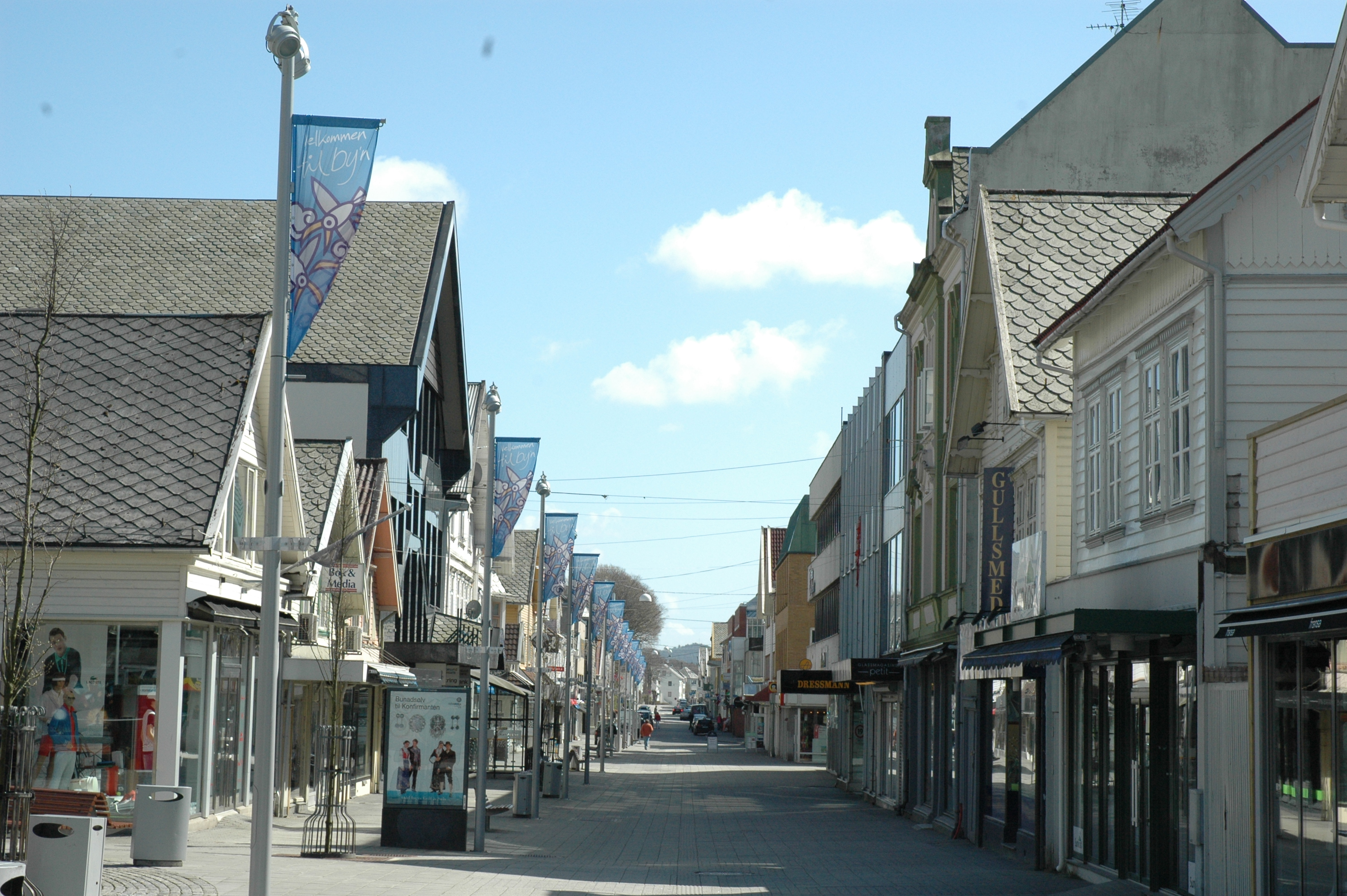 Haraldsgata mot sør, Haugesund